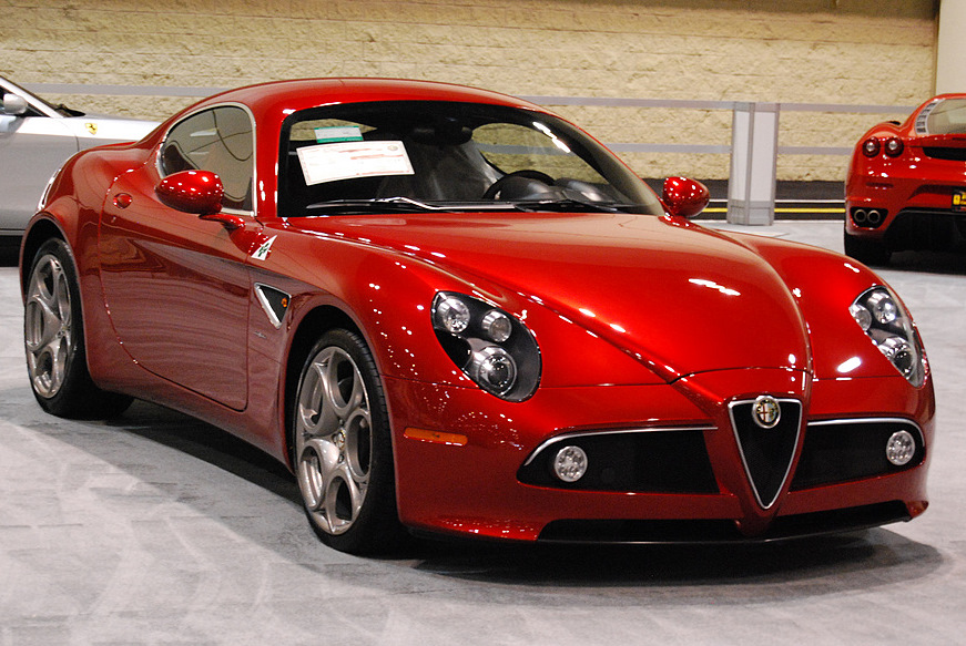 AR8C-Competizione